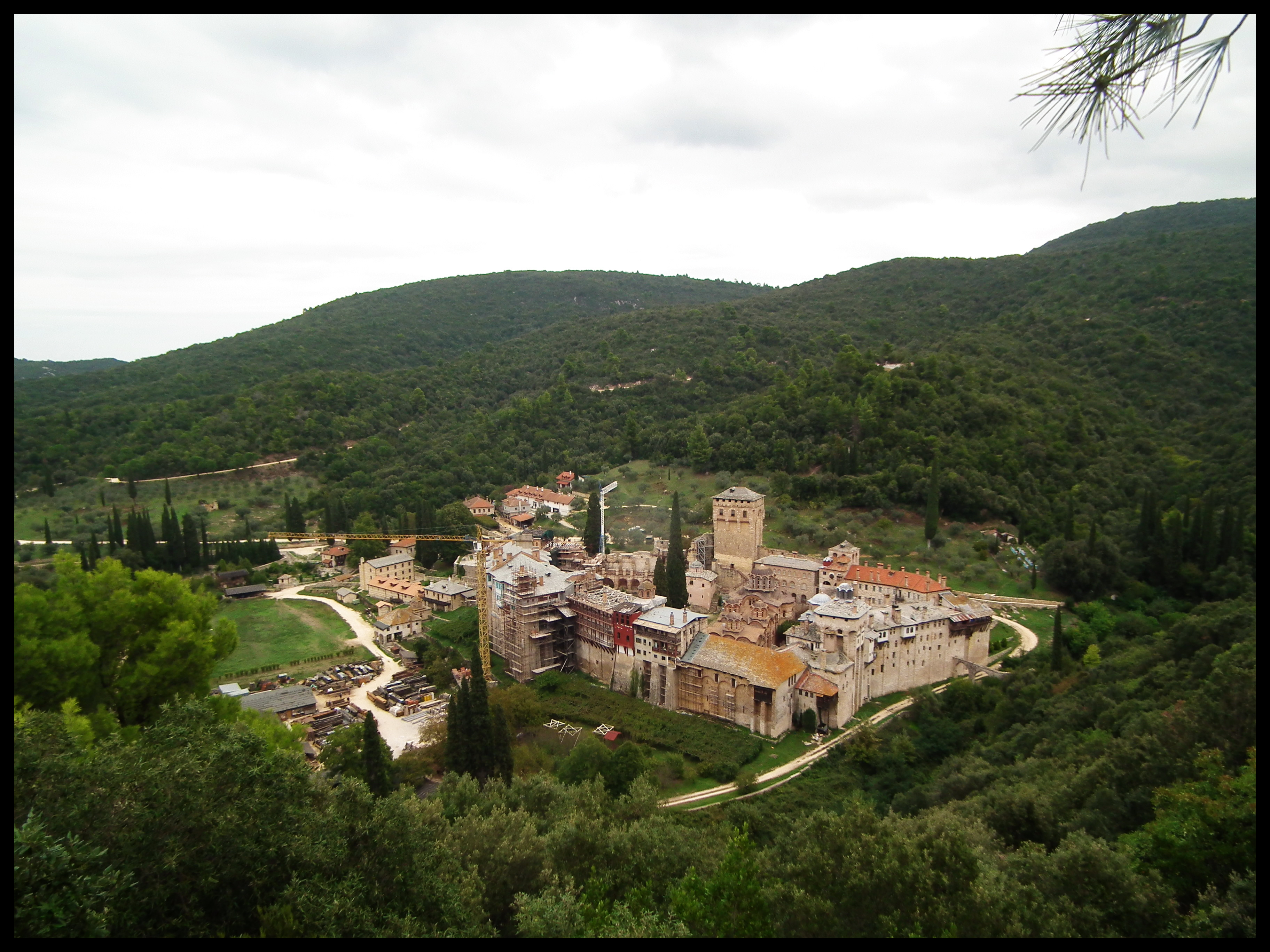 „…Једино овде, Царице Небеса, на мом језику се моли без застанка, и не лаже ништа, и не једе меса, и осам векова пости без престанка…“